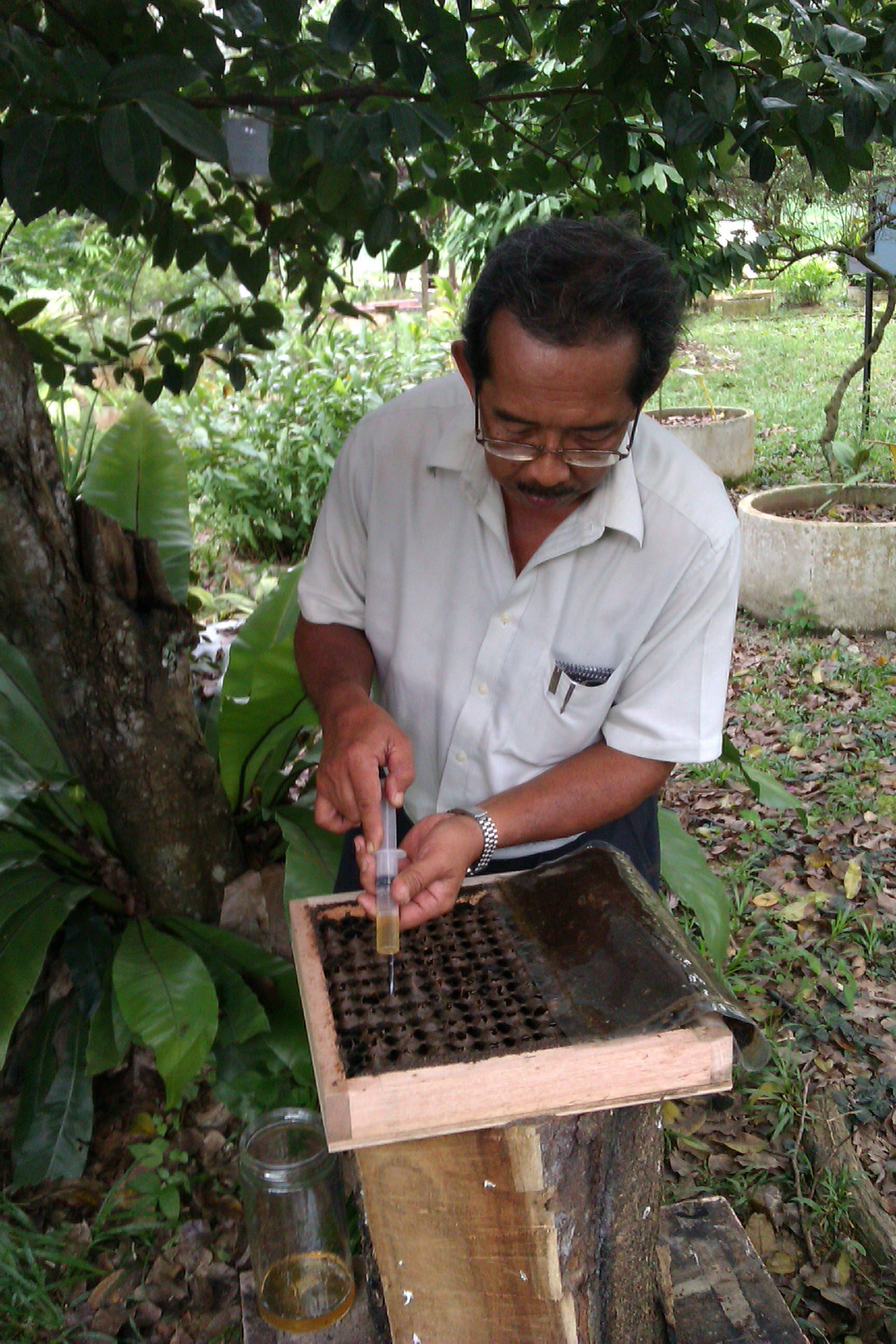 Pemelihara lebah kelulut sedang memungut madu kelulut dari koloni kelulut.